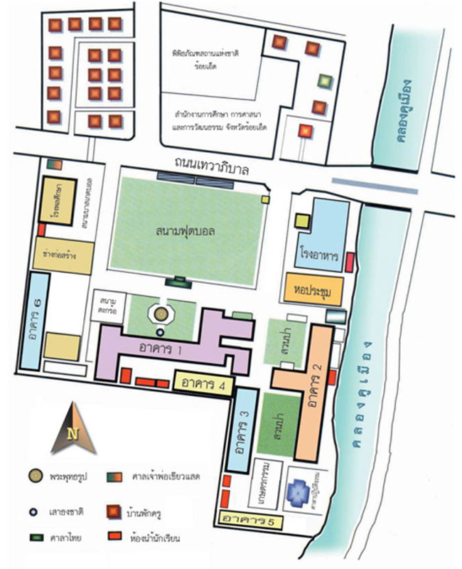 แผนที่โรงเรียนร้อยเอ็ดวิทยาลัย